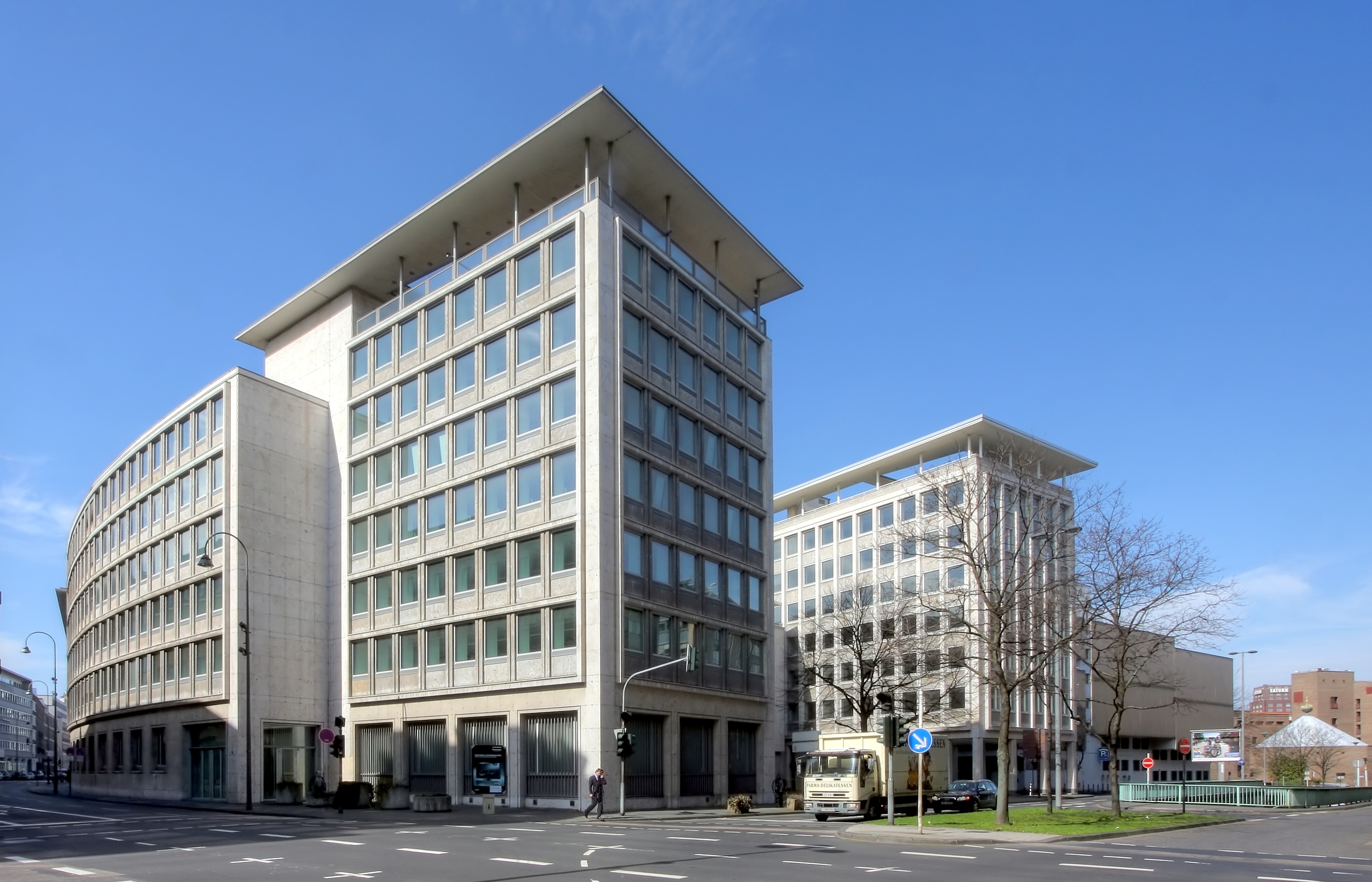 Ehemalige Gebäude der Herstatt-Bank, Unter Sachsenhausen 6, Köln. Ansicht von der Ecke Unter Sachsenhausen/Tunisstraße. Architekt des vorderen Blocks: Hanns Koerfer, Baujahr: 1957 Architekten des hinteren Blocks: Franz Sobotka & Gustav Müller, Baujahr: 1962/64